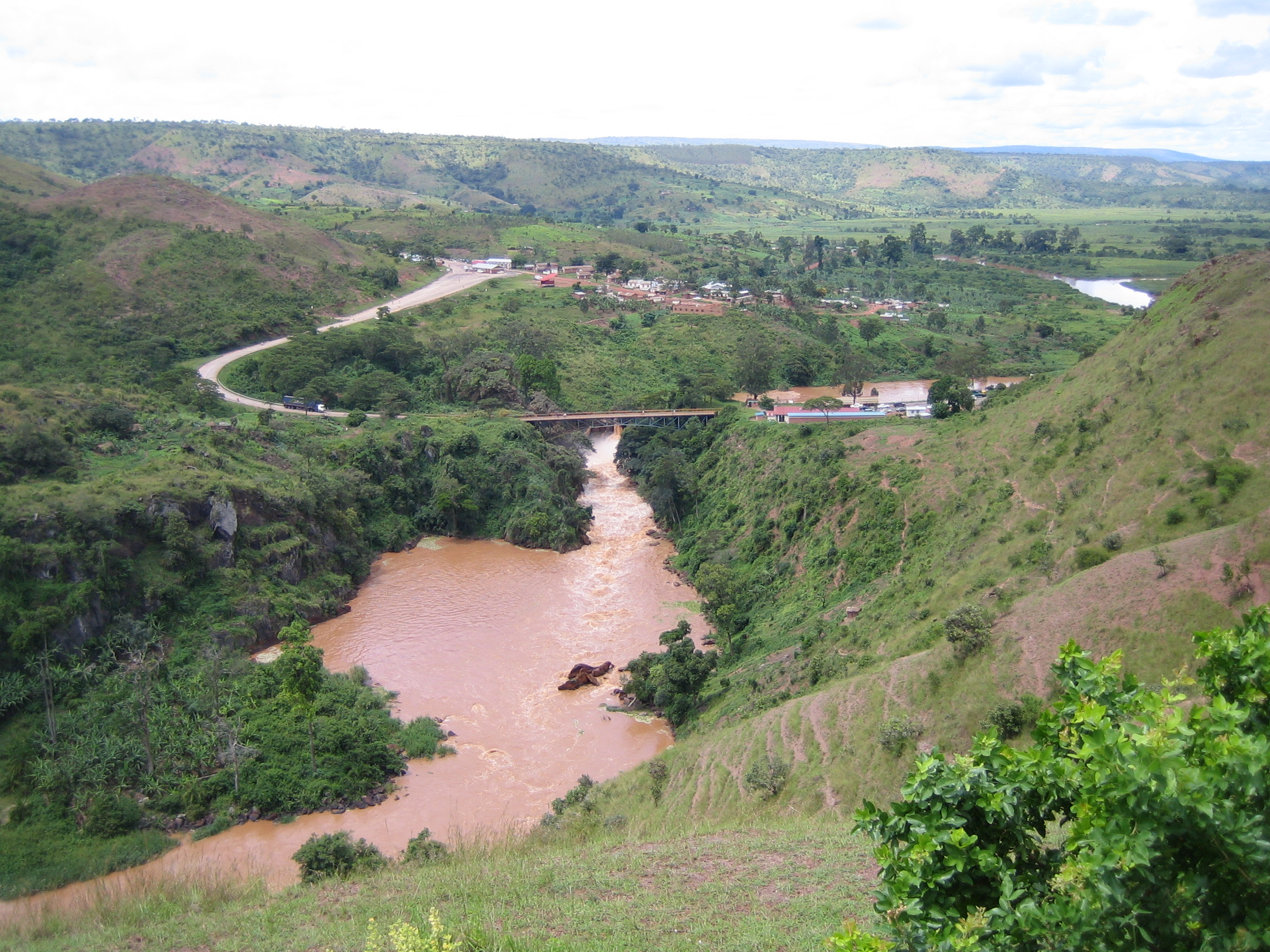 Taken by SteveRwanda